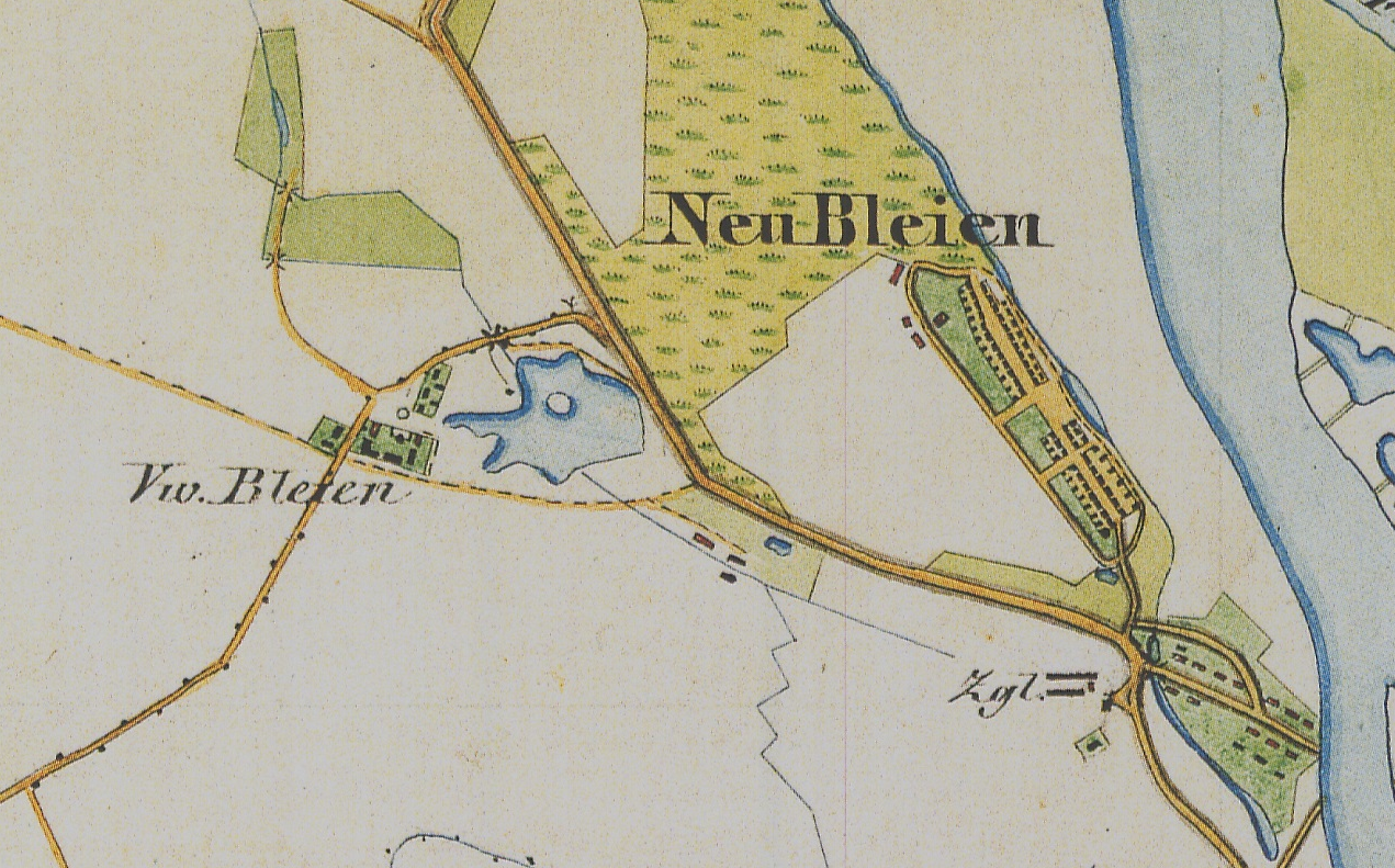 Bleyen, Ortsteil der Gemeinde Bleyen-Genschmar, Gemeinde Küstriner Vorland, Landkreis Märkisch-Oderland, Brandenburg, Ausschnitt aus dem Urmesstischblatt 3453 Küstrin-Kietz von 1857